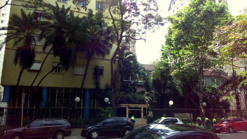 Diferença arquitetônica entre a parte esquerda e a parte direita da fachada do Edifício Bretagne, São Paulo (SP), Brasil